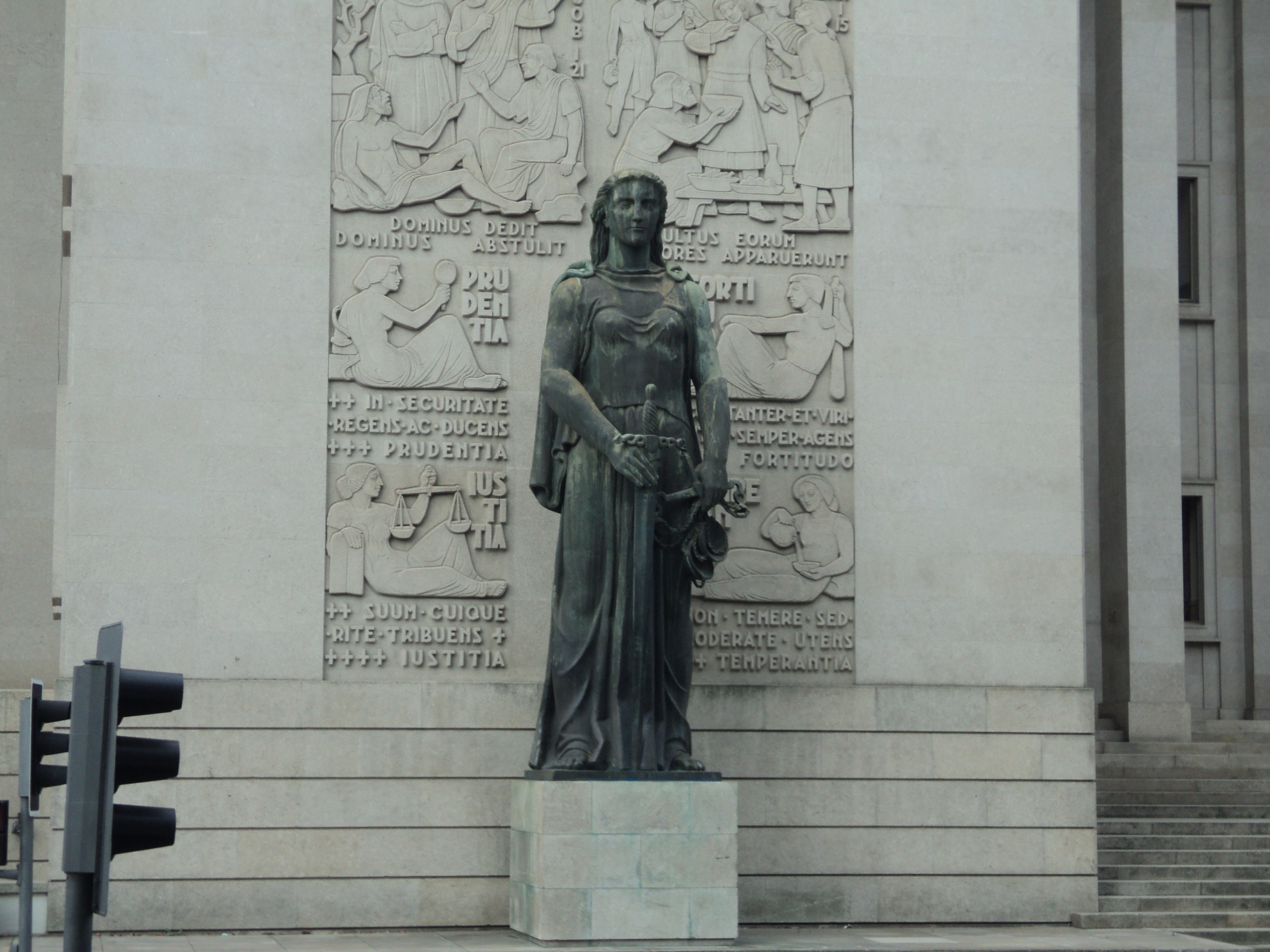 Baixo relevo e escultura na frente do Palácio da Justiça da cidade do Porto. This file was uploaded for Wiki Loves Monuments in Portugal with the unique identifier 15546. This building is classified as Incluído em sítios classificados.